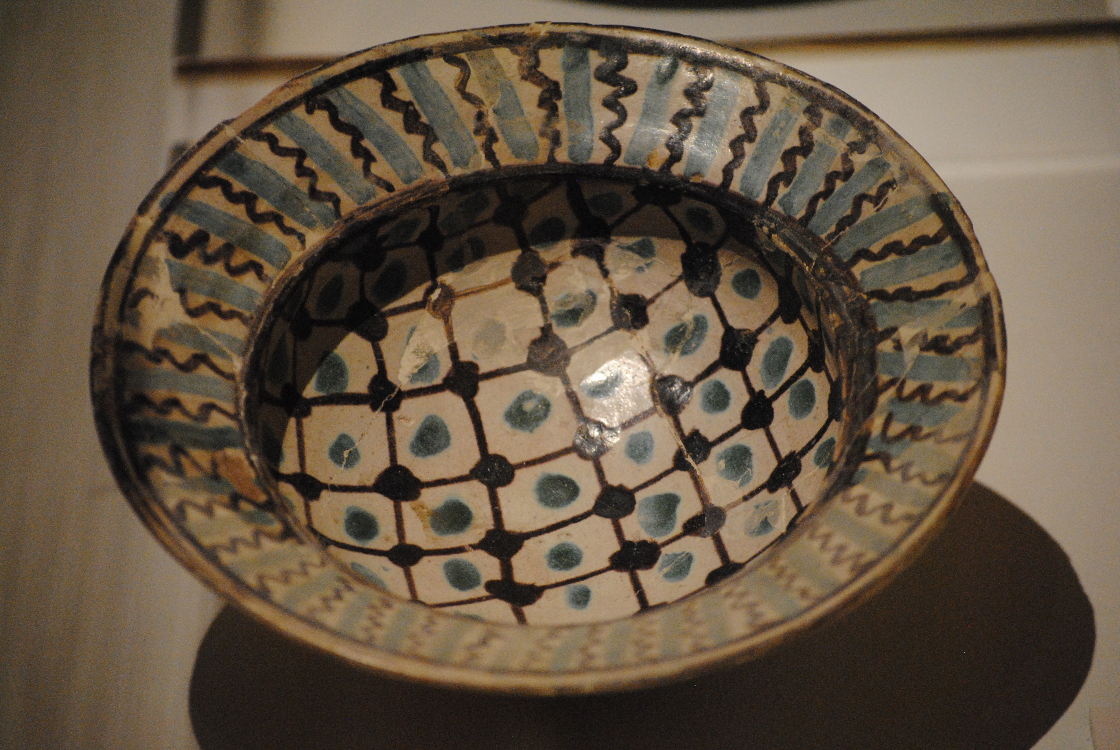 Scodella con tesa - protomaiolica dell'Italia meridionale (Puglia), importata alla fine del XII secolo e usata come bacino ceramico (chiesa si San Paolo all'Orto, Pisa) - Museo nazionale di San Matteo.